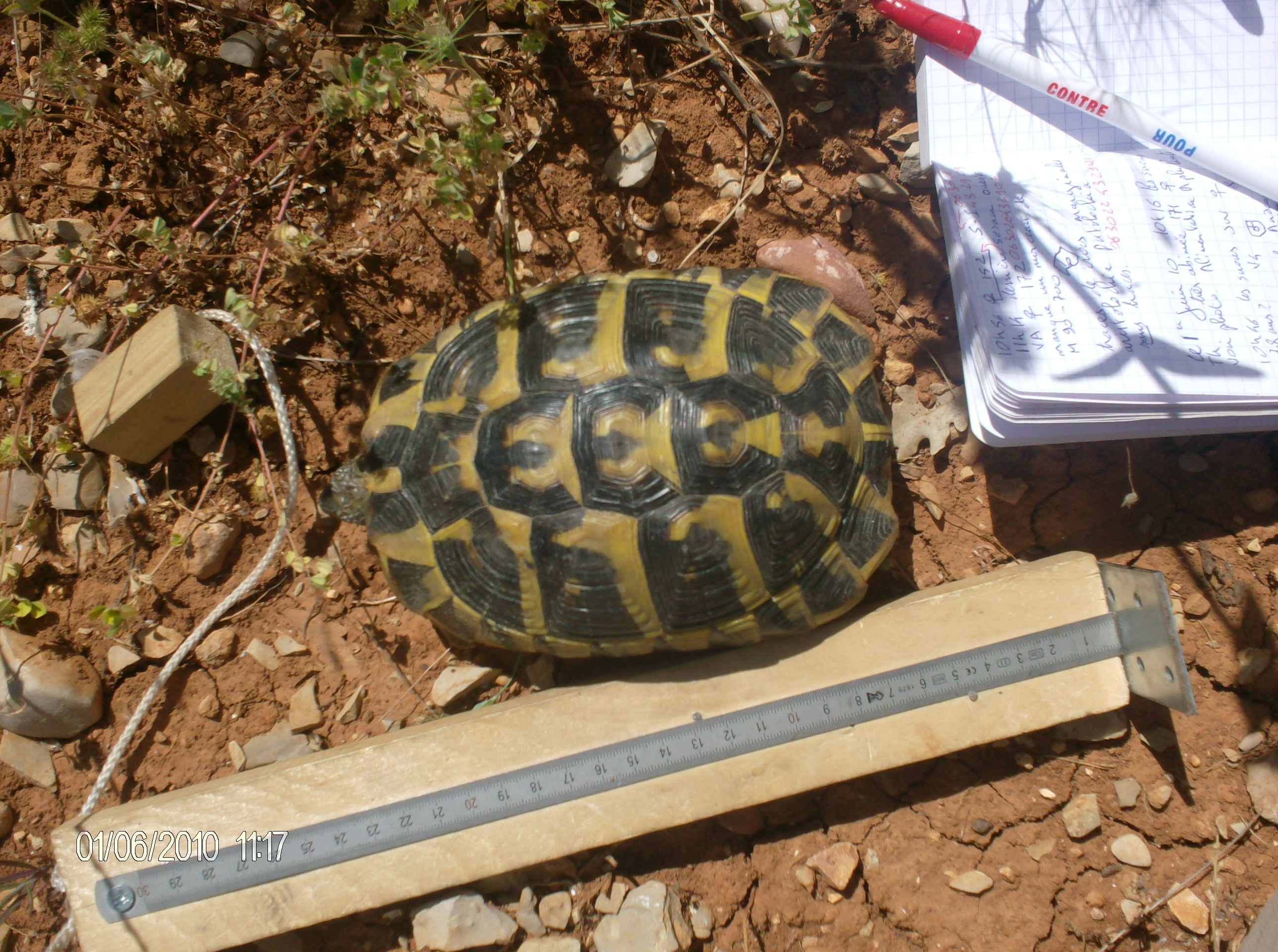 Cette photo illustre le travail de prospection ou de recensement de la tortue d'Hermann dans le Var (France)